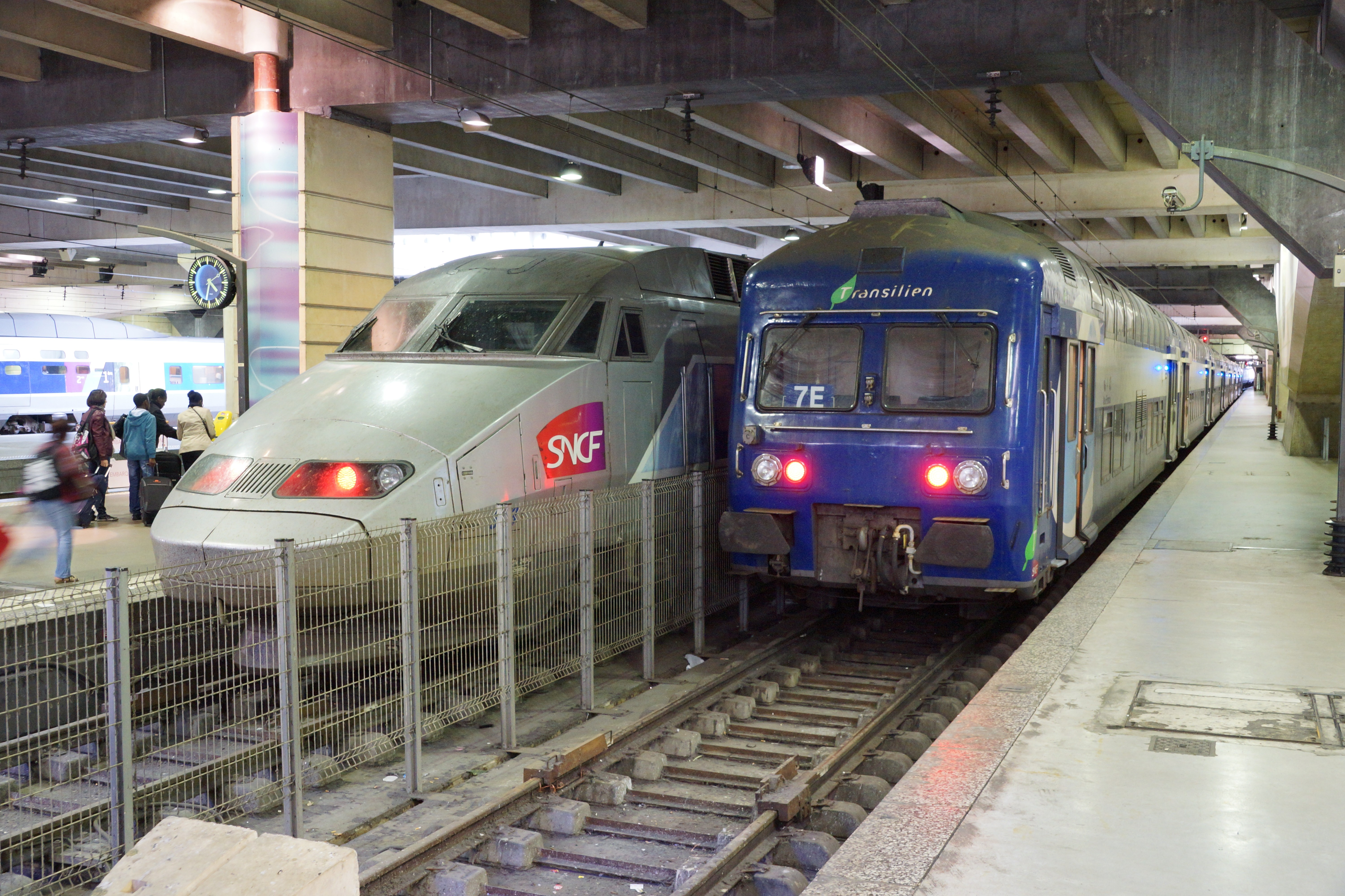 Gare Montparnasse, Paris, France.